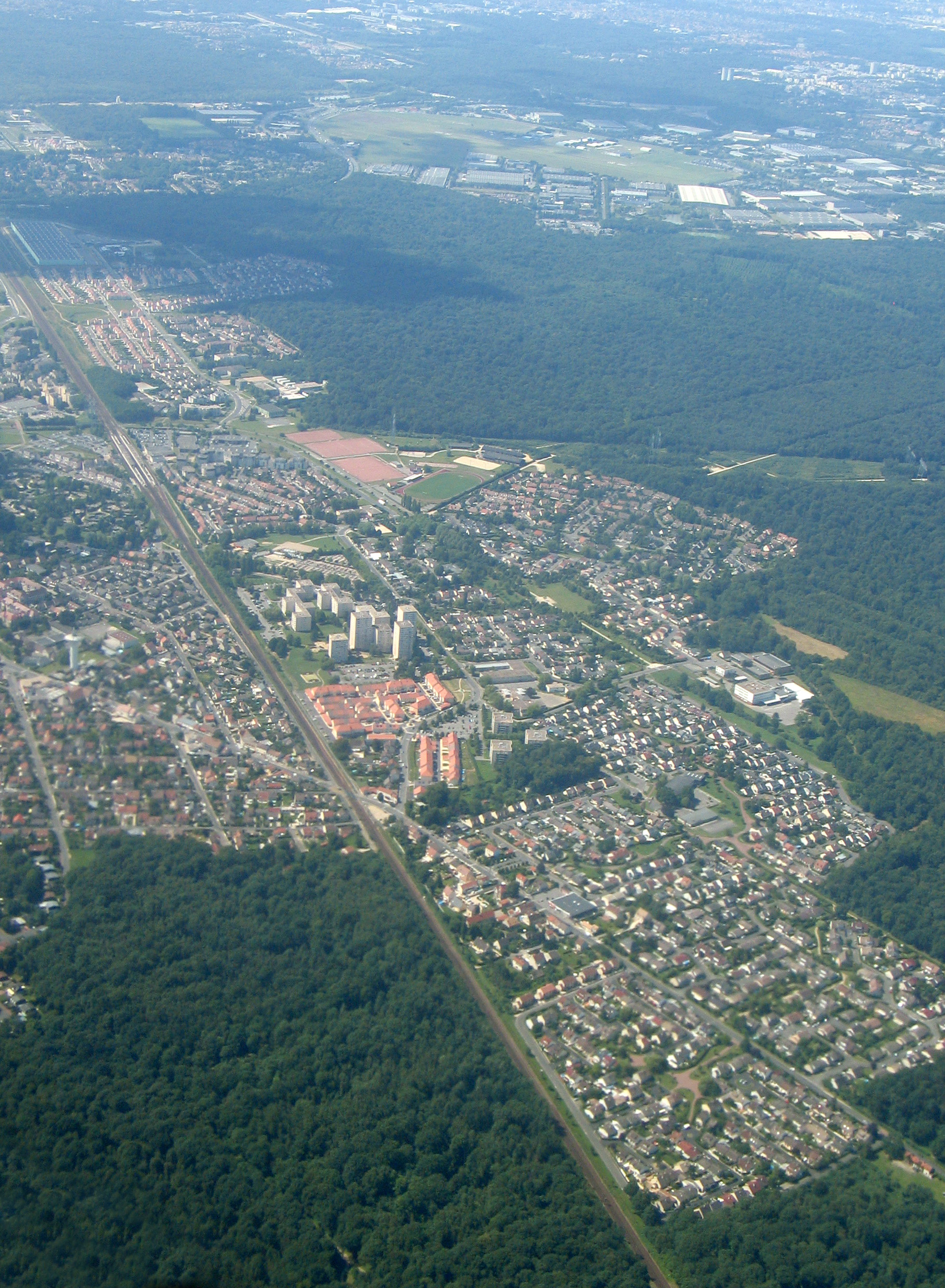 Roissy-en-Brie vue d'avion